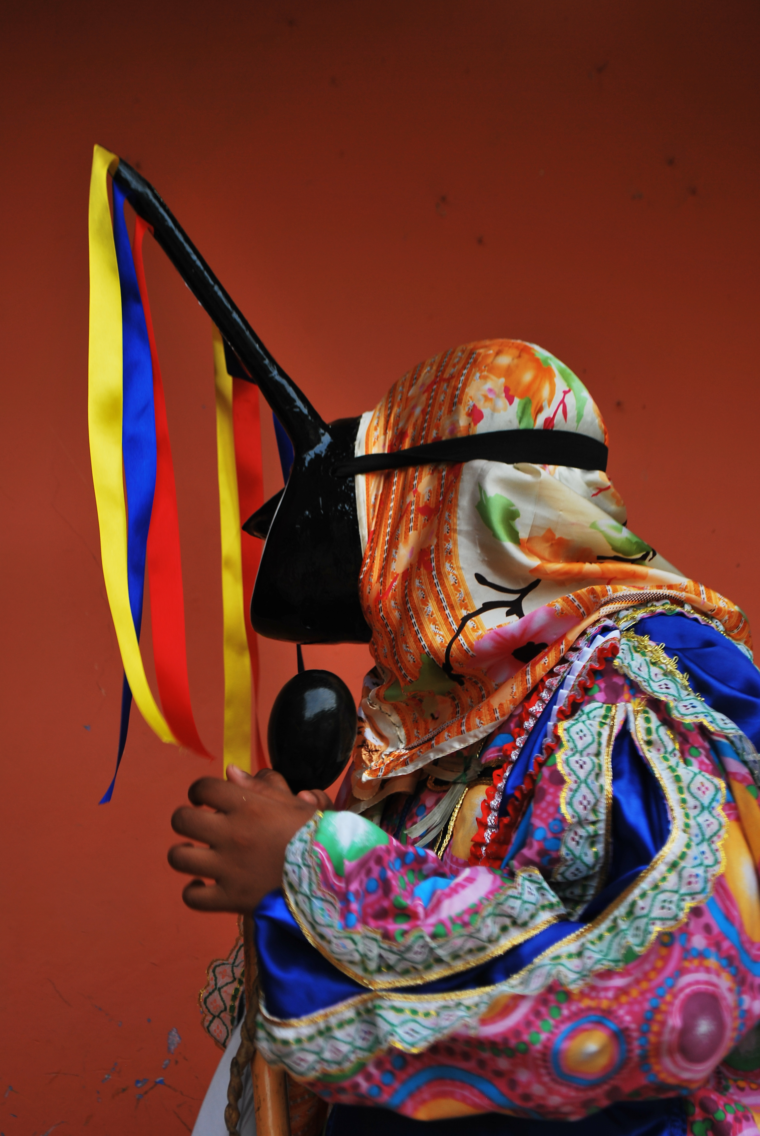 El dia de Corpus Christi se celebra la fiesta de los diablos danzantes en las diferentes cofradías que existen en Venezuela. Los diablos de Chuao con su cintas tricolor y su vestimenta vistosa.